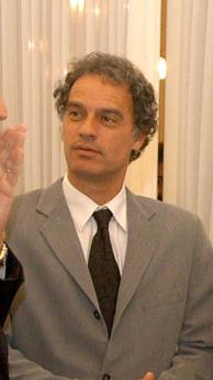 Anibal Ibarra